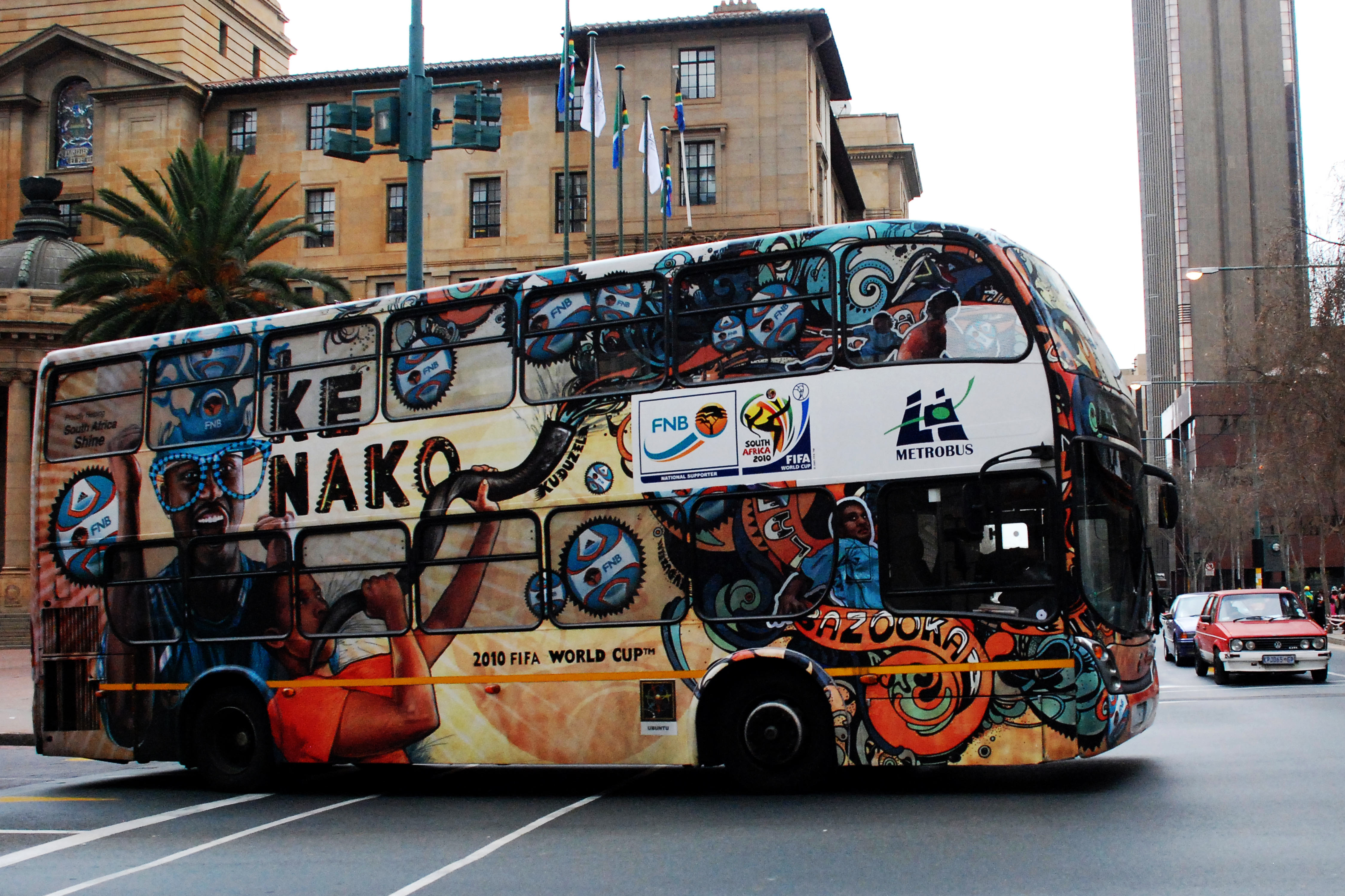 Métrobus transportant les supporters de football dans les rues de Durban pendant la coupe du monde 2010 en Afrique du Sud. This is an image with the theme "Africa on the Move or Transport" from: South Africa